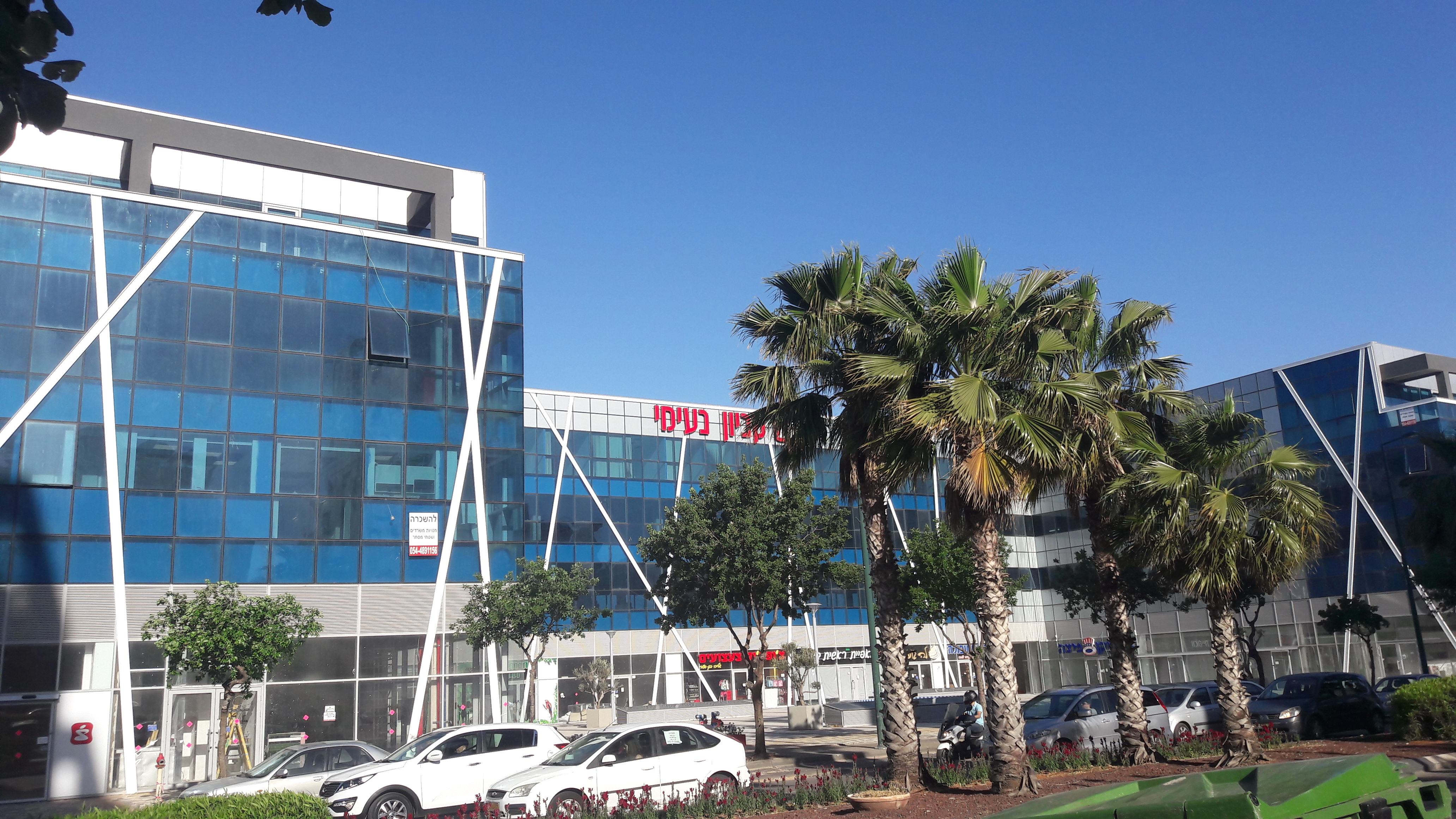 קניון נעימי שבנתניה